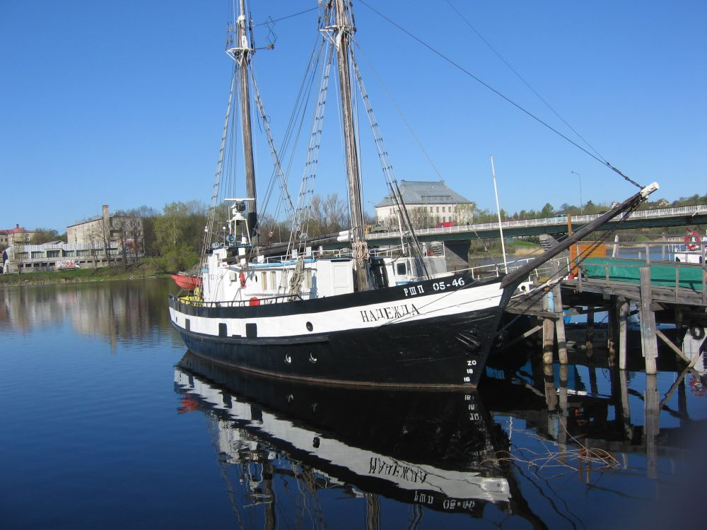 Sortavala harbour, Karelia